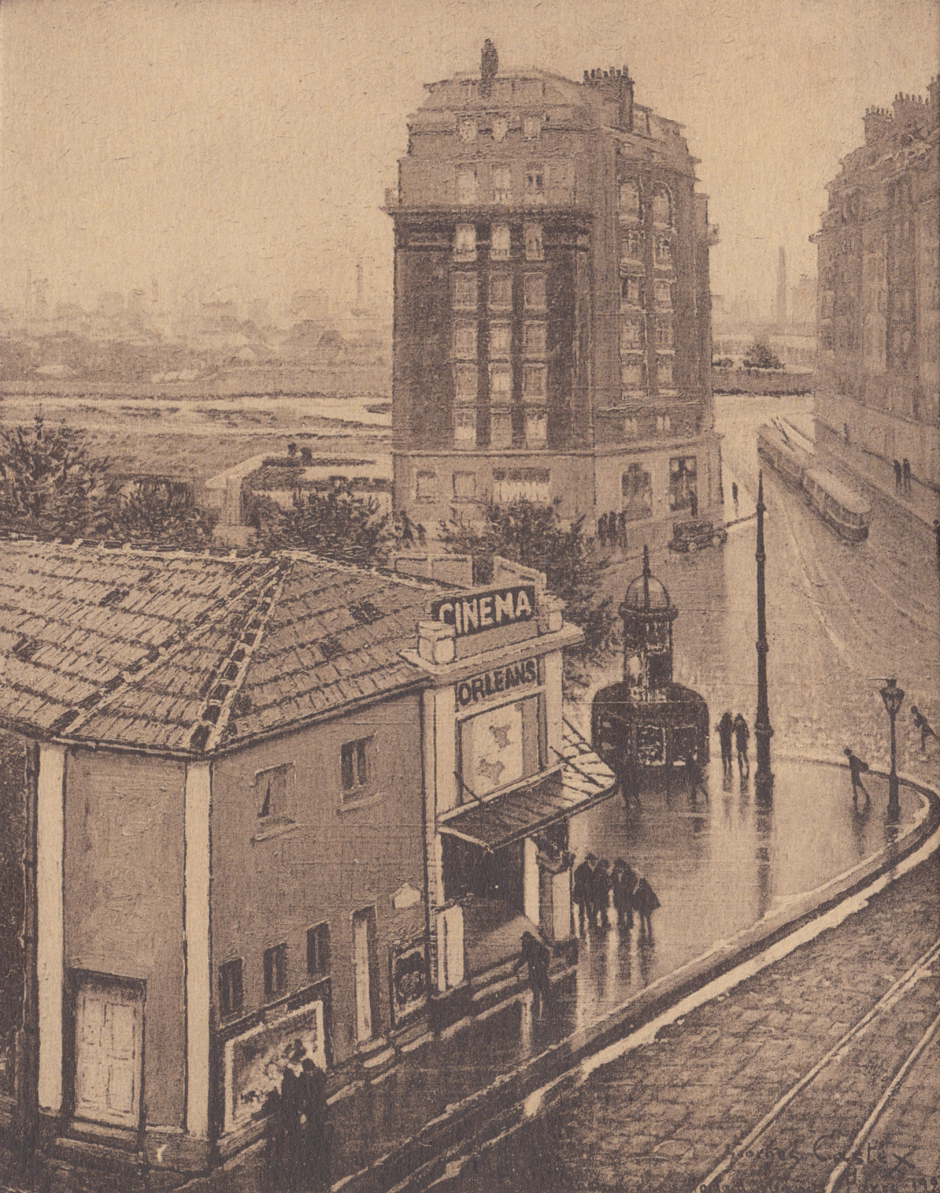 Georges Castex, Paris, Le Cinéma de la Porte d'Orléans (100-102, boulevard Jourdan); carte postale, à dos divisé; Imp. H. Basuyau & Cie., Toulouse